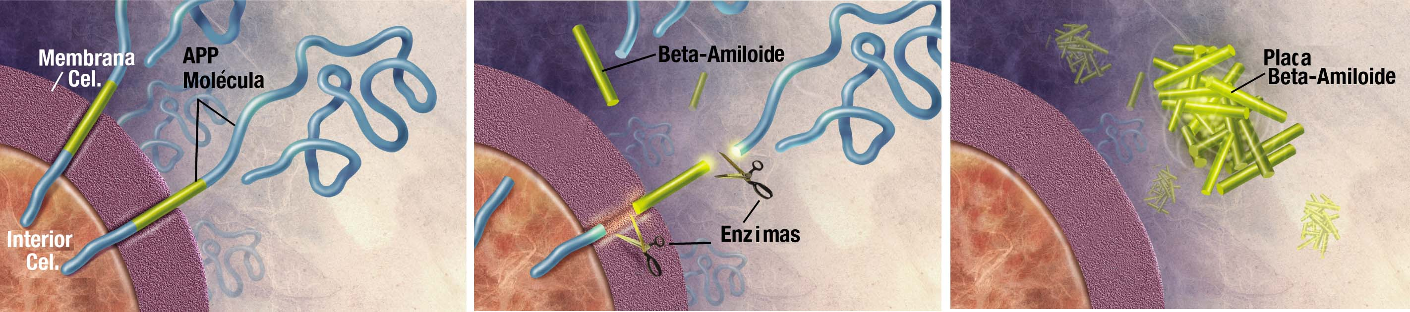 Diversas enzimas actúan sobre la Proteína Precursora de Amiloides (APP) y la cortan en fragmentos, uno de los cuales es el beta-amiloide el cual es indispensable para la formación de placas seniles característica de la enfermedad de Alzheimer.